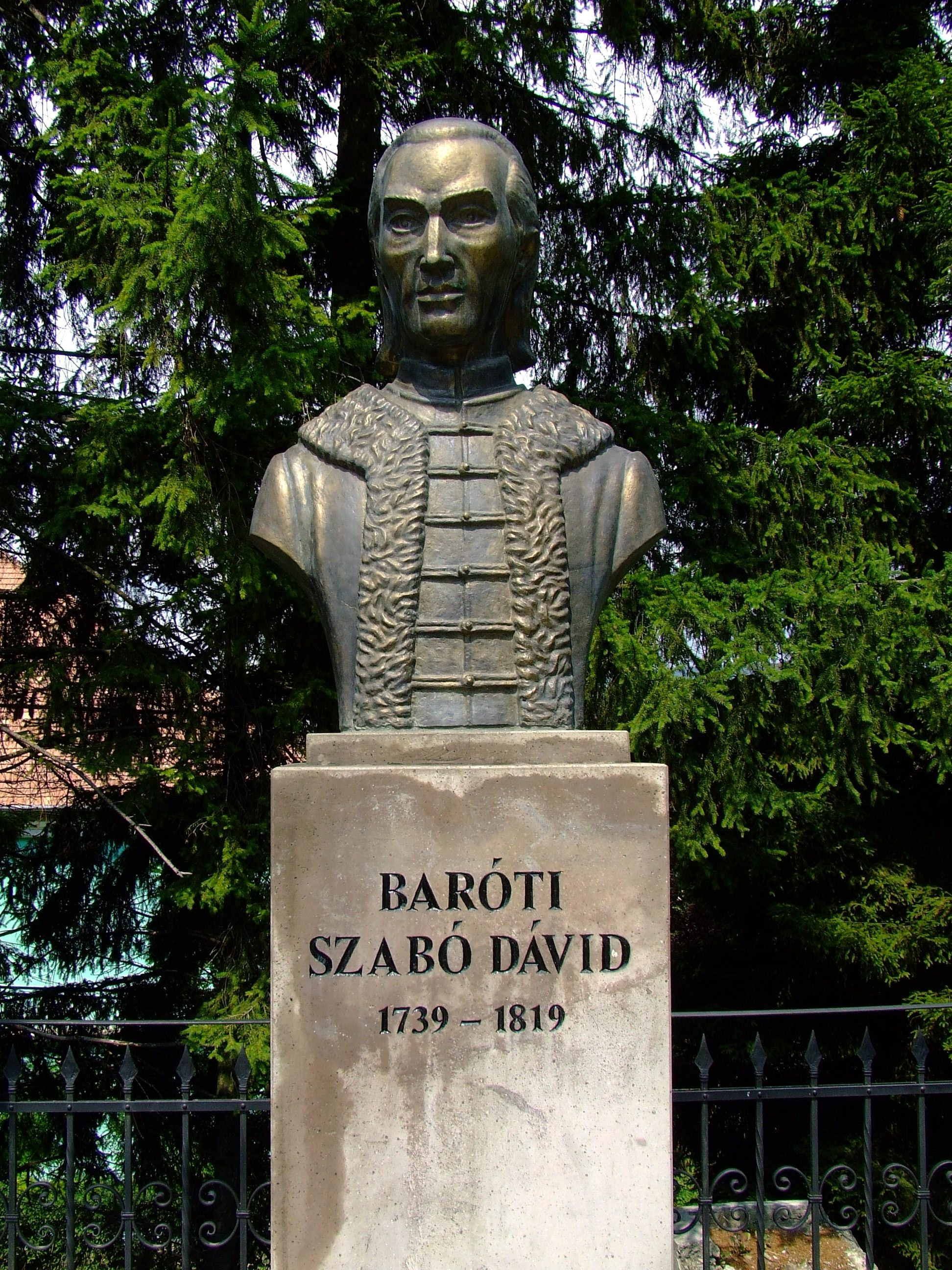 Baróti Szabó Dávid (1739–1819) költő és nyelvújító, jezsuita, később világi pap és tanár szobra Székelyudvarhelyen